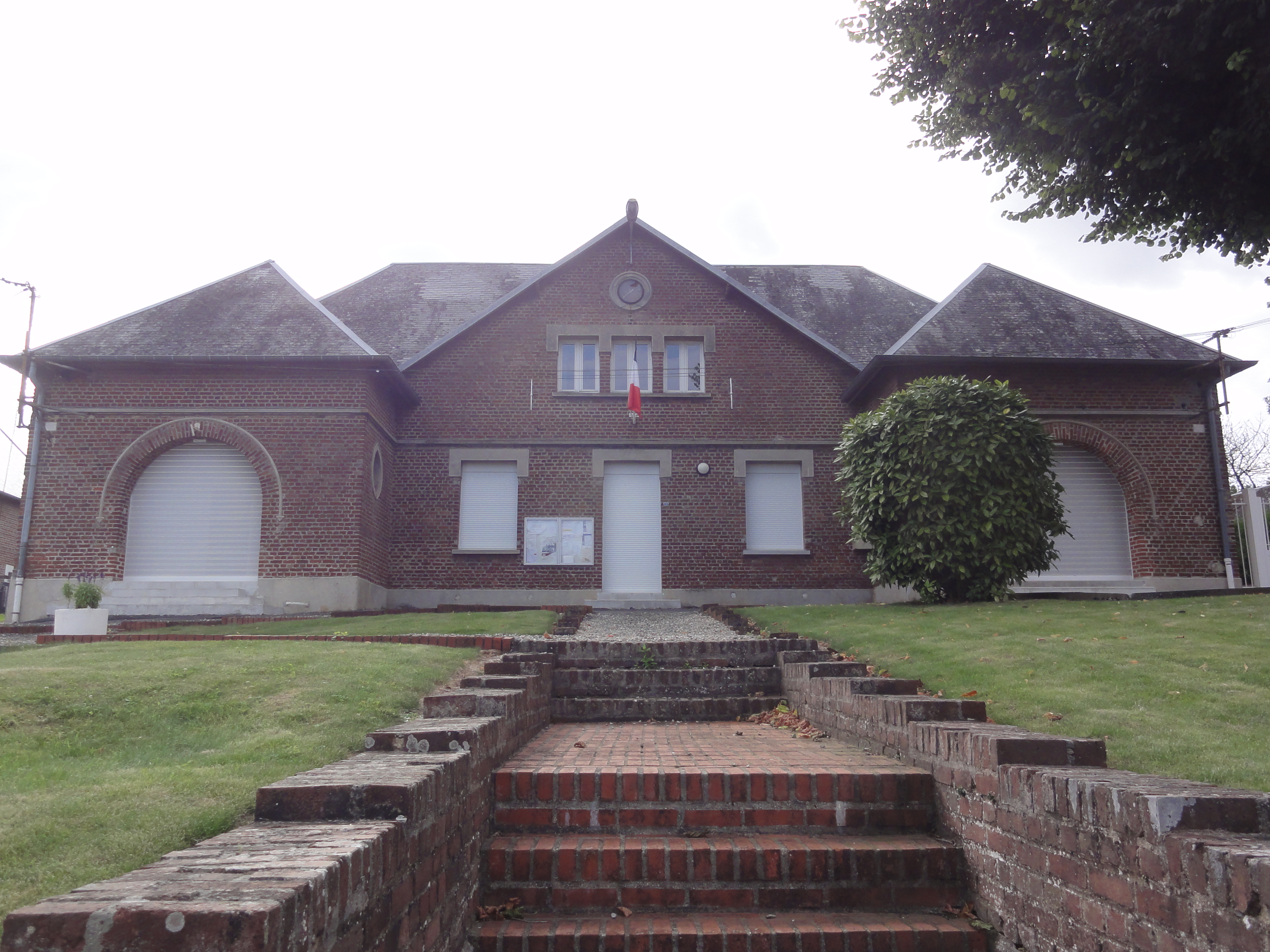 Dallon (Aisne) mairie